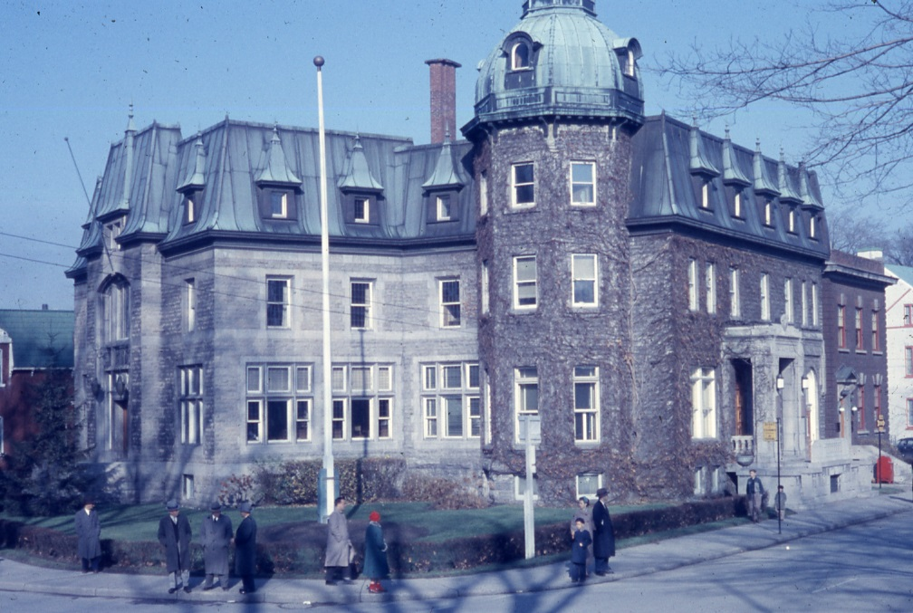 Diapositive couleur illustrant l’Hôtel de Ville de Saint-Hyacinthe dans la région administrative de la Montérégie.